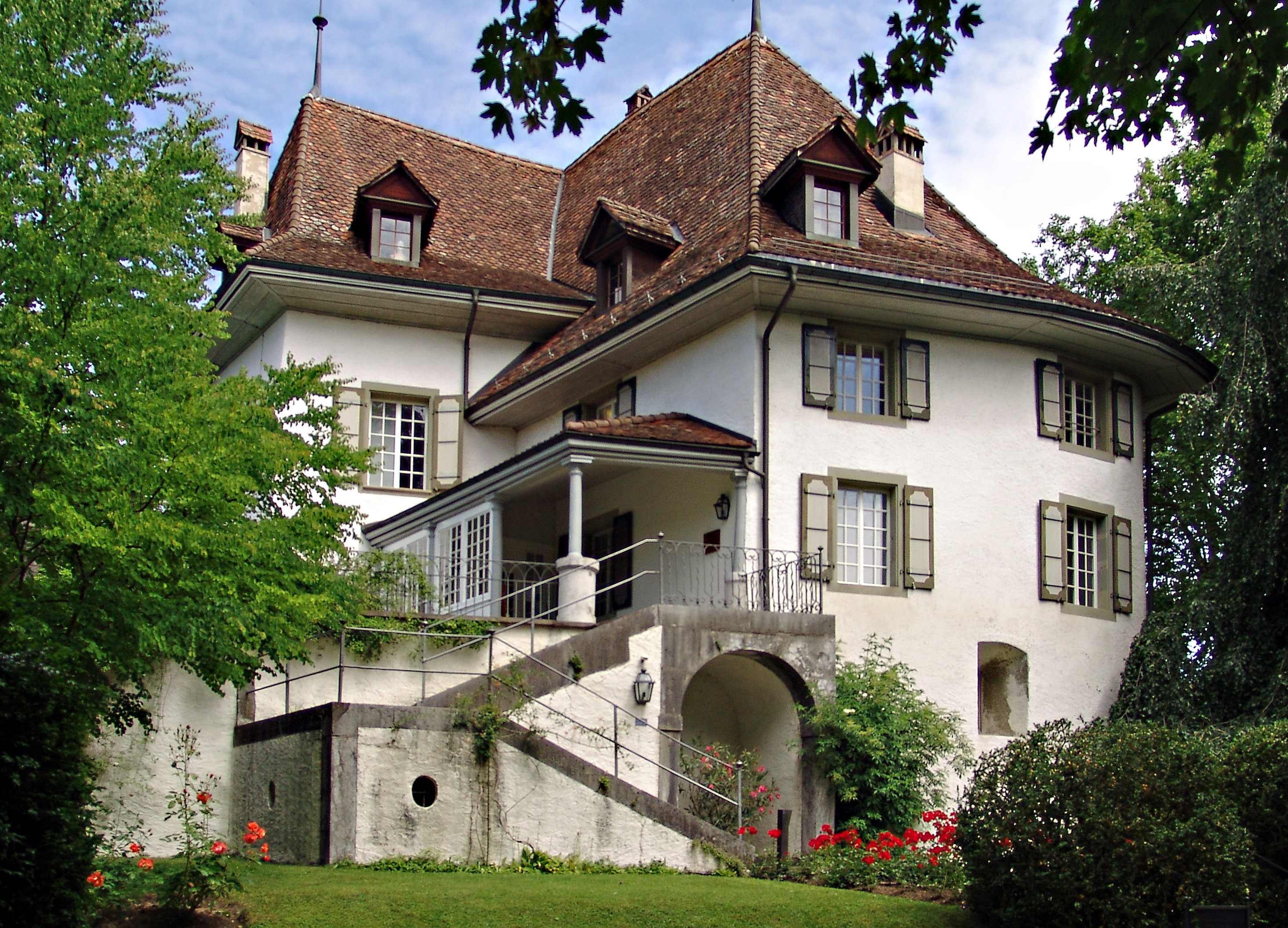 Schloss Münsingen Schweiz, im Besitz der Gemeinde, dient als Museum